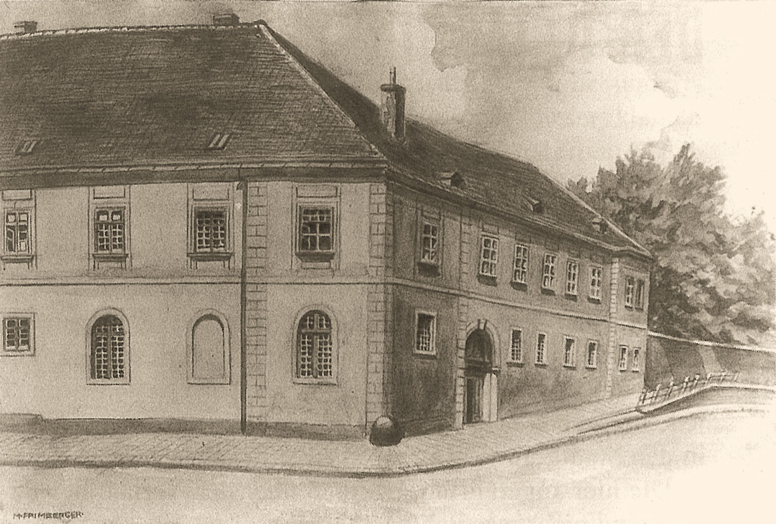 de: Der Freihof zu einer Zeit, als bereits als "Schottenhof" bekannt war (um 1800), Zeichnung von M. Frimberger